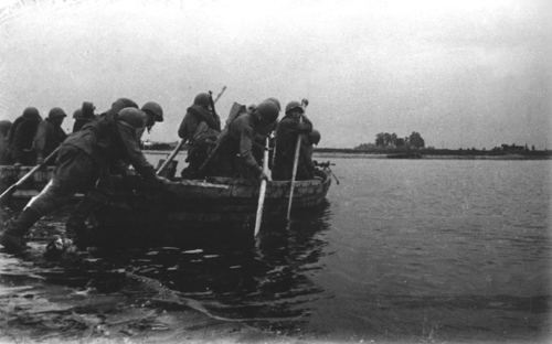 Форсирование Днепра возле Розумовки